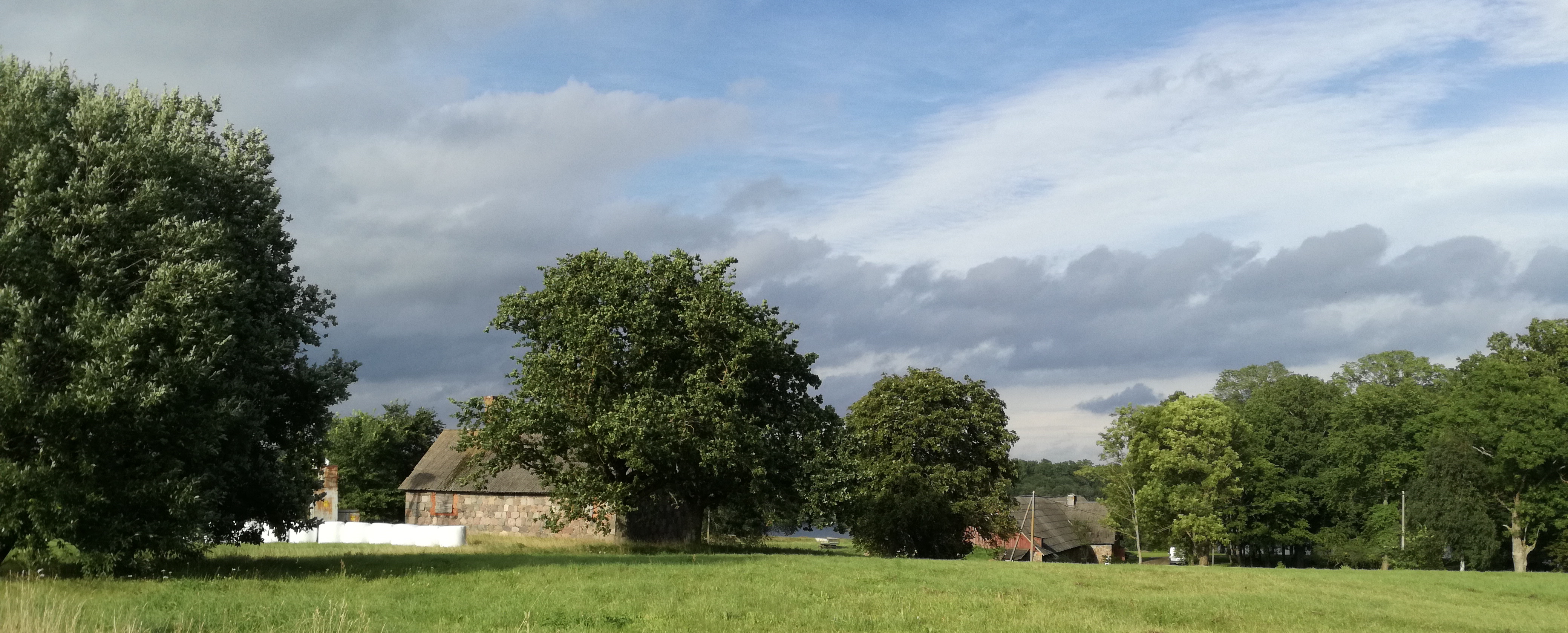 Ait-kuivati (vasakul) ja karjamõisa laut (paremal) Aindu külas 2016. aastal pildistatuna Viljandi teelt